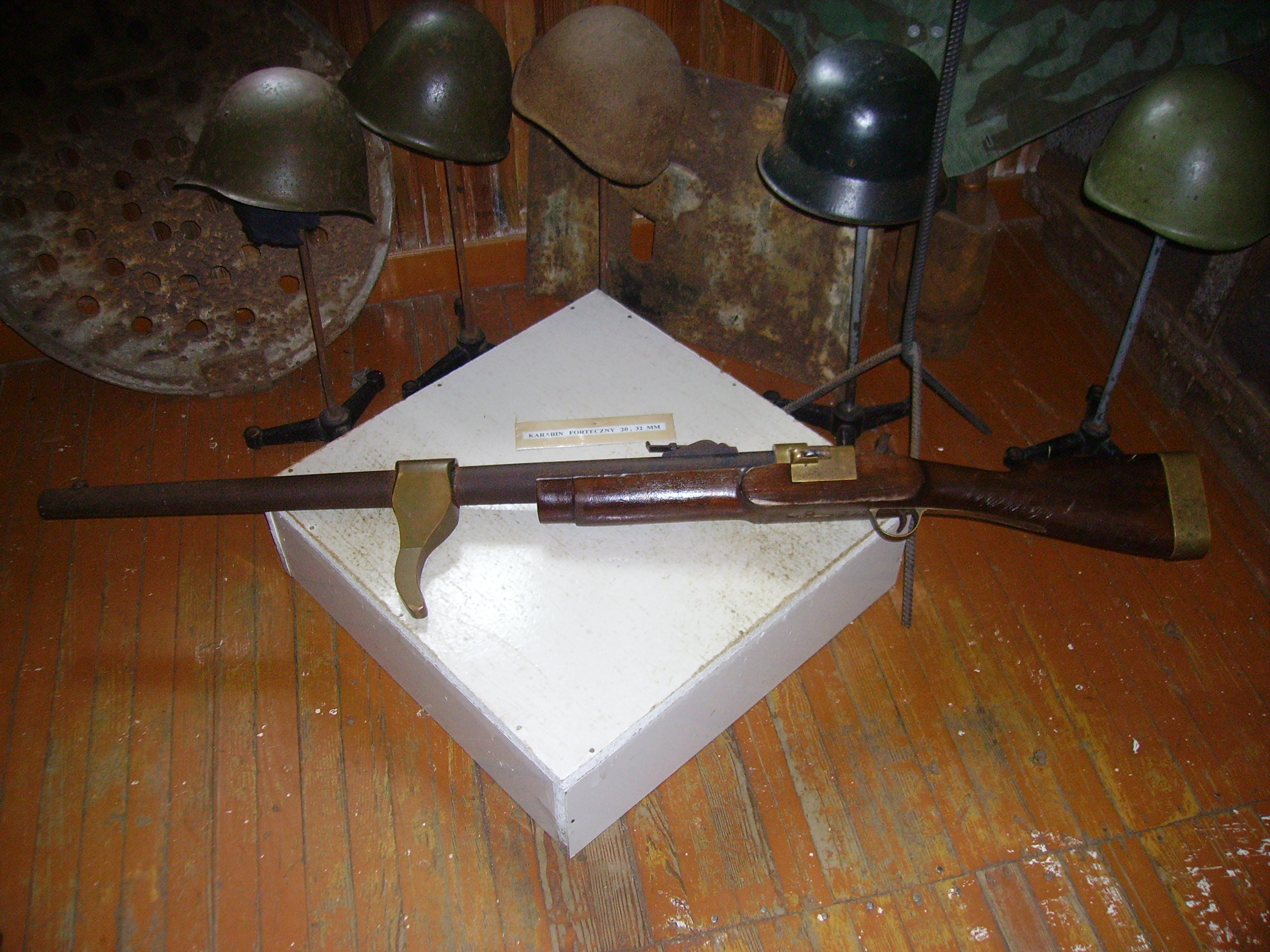 Karabin forteczny syst. Hana-Kmka wz. 1876 kal. 20,3 mm